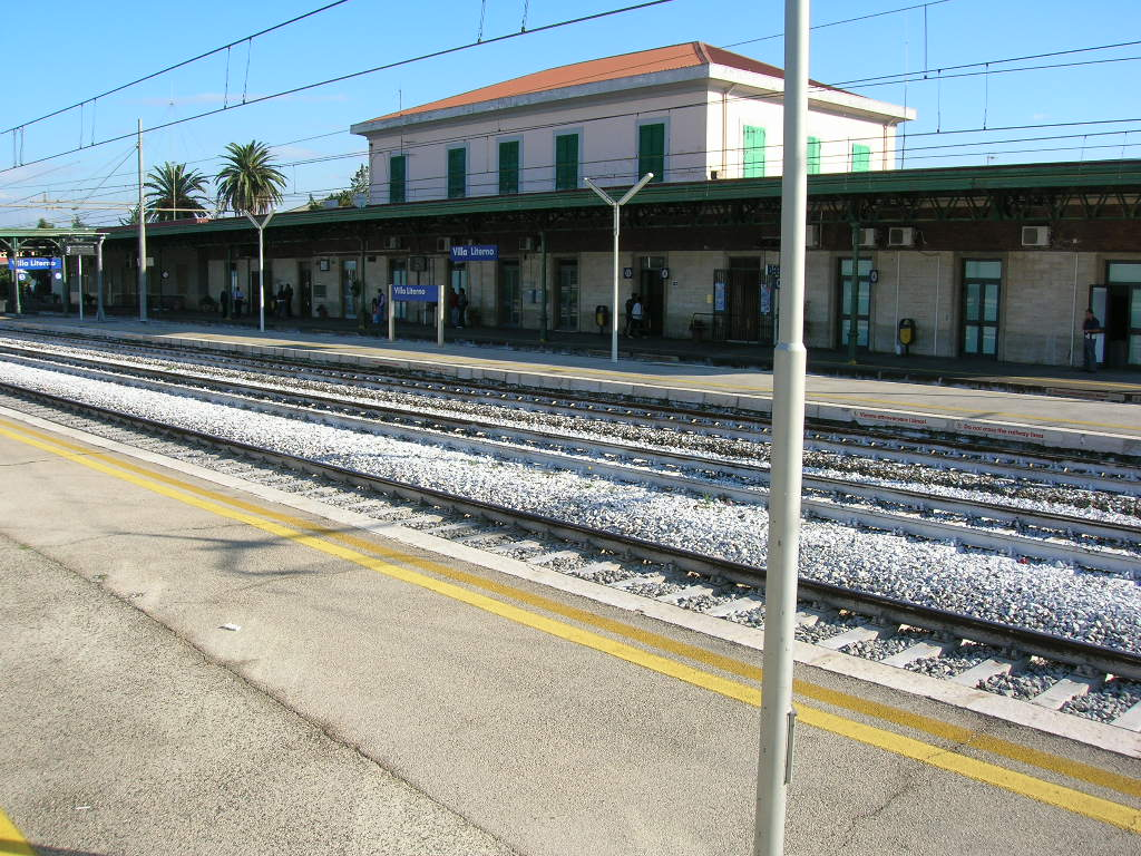 Lato binari del fabbricato viaggiatori e piazzale ferroviario della stazione di Villa Literno